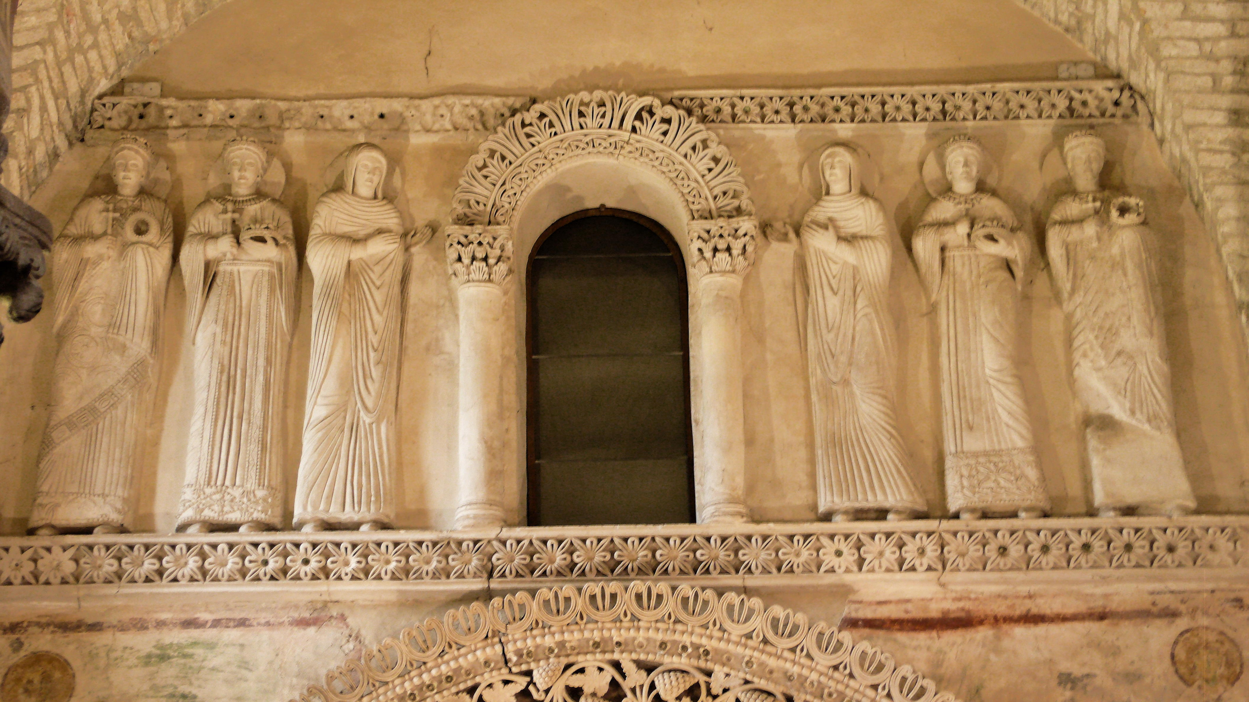 Cividale del Friuli, Tempietto longobardo